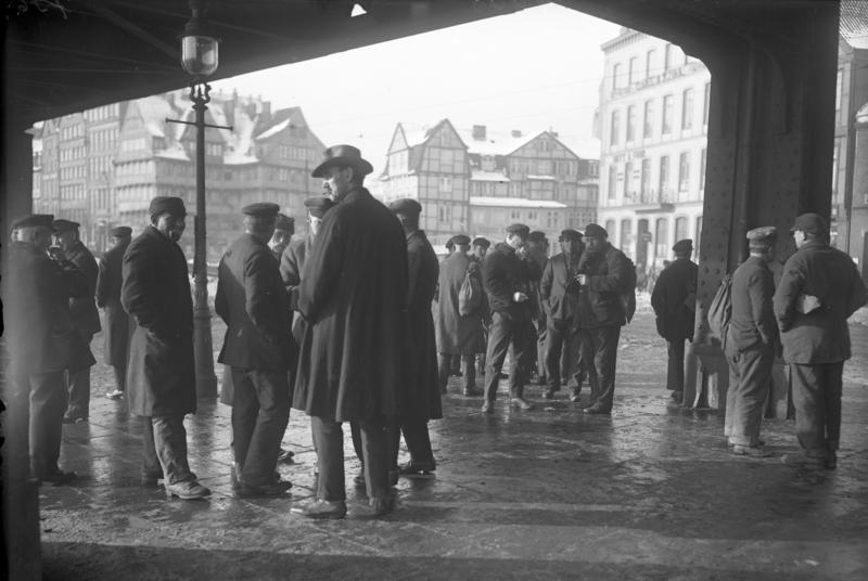 Die Not unserer Zeit! Arbeitslose Hafenarbeiter im Hamburger Hafenviertel.